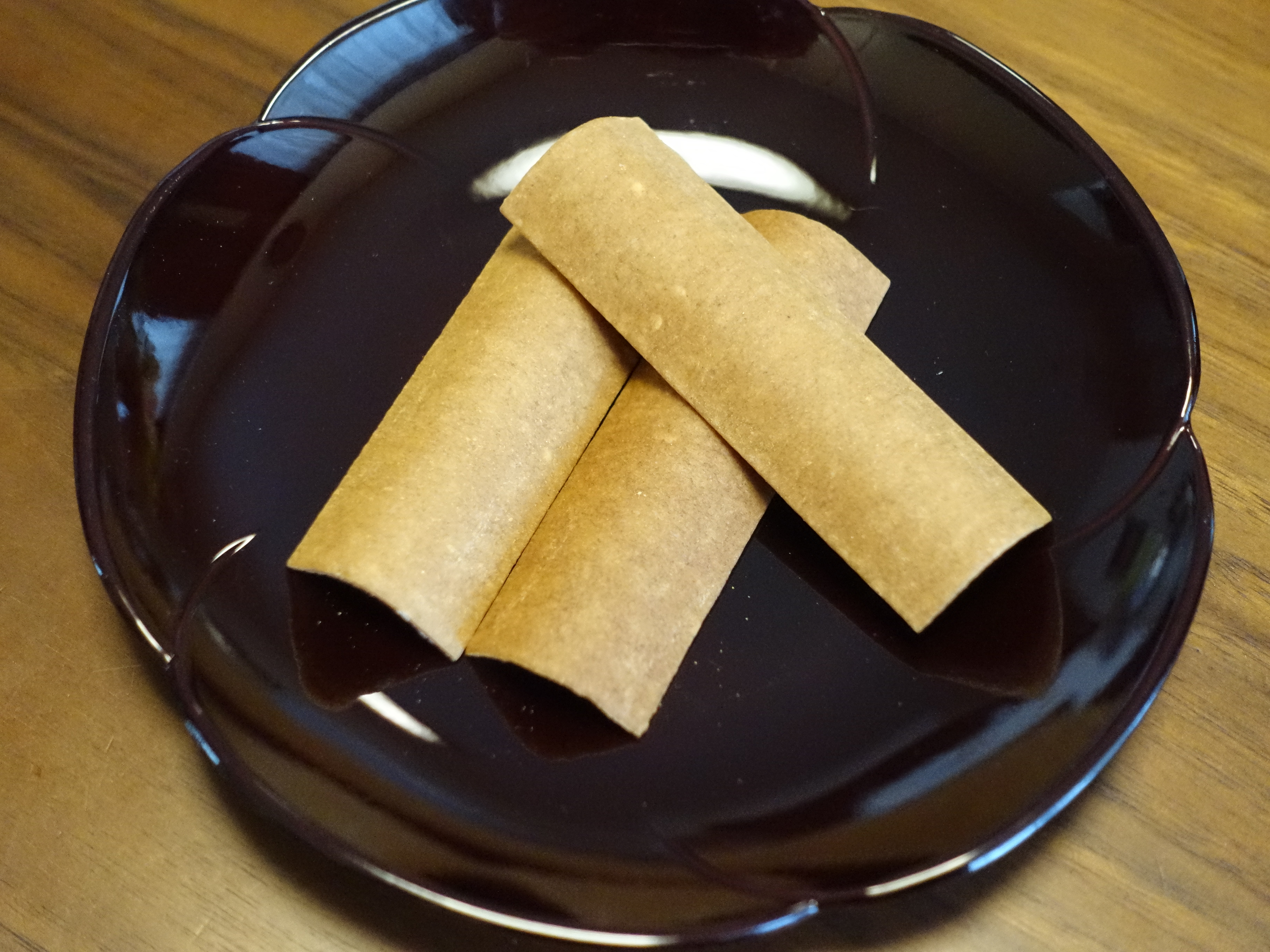 八ツ橋（井筒八ッ橋本舗） 2016年4月22日撮影